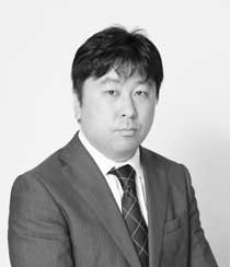 守屋 英一